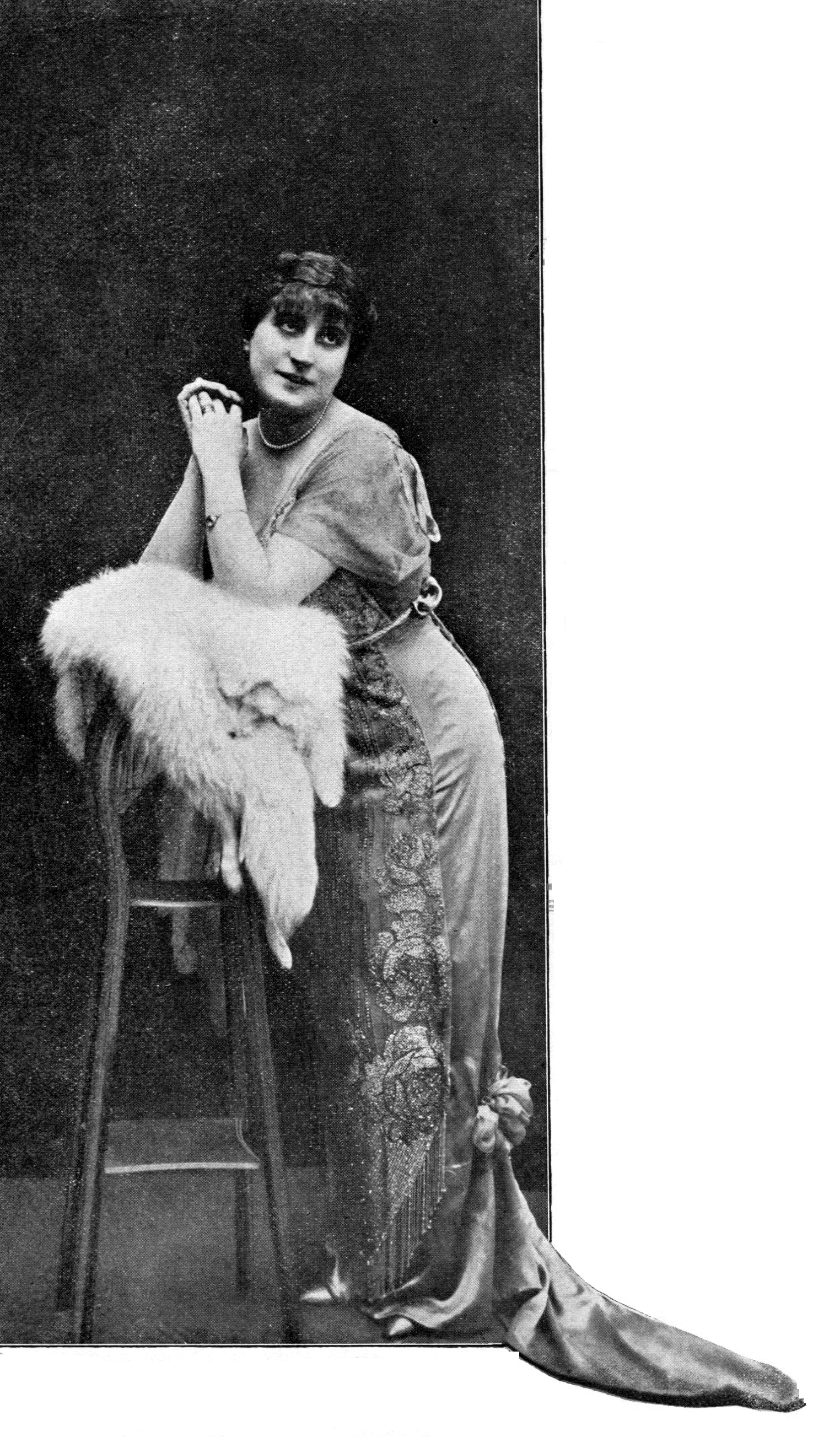 L'attrice italiana del muto Mary Cléo Tarlarini in un immagine del dicemebre 1914